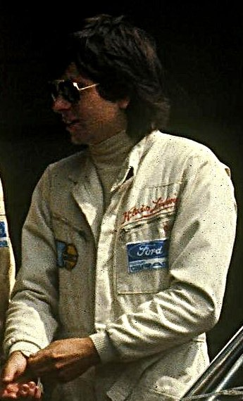 Klaus Ludwig